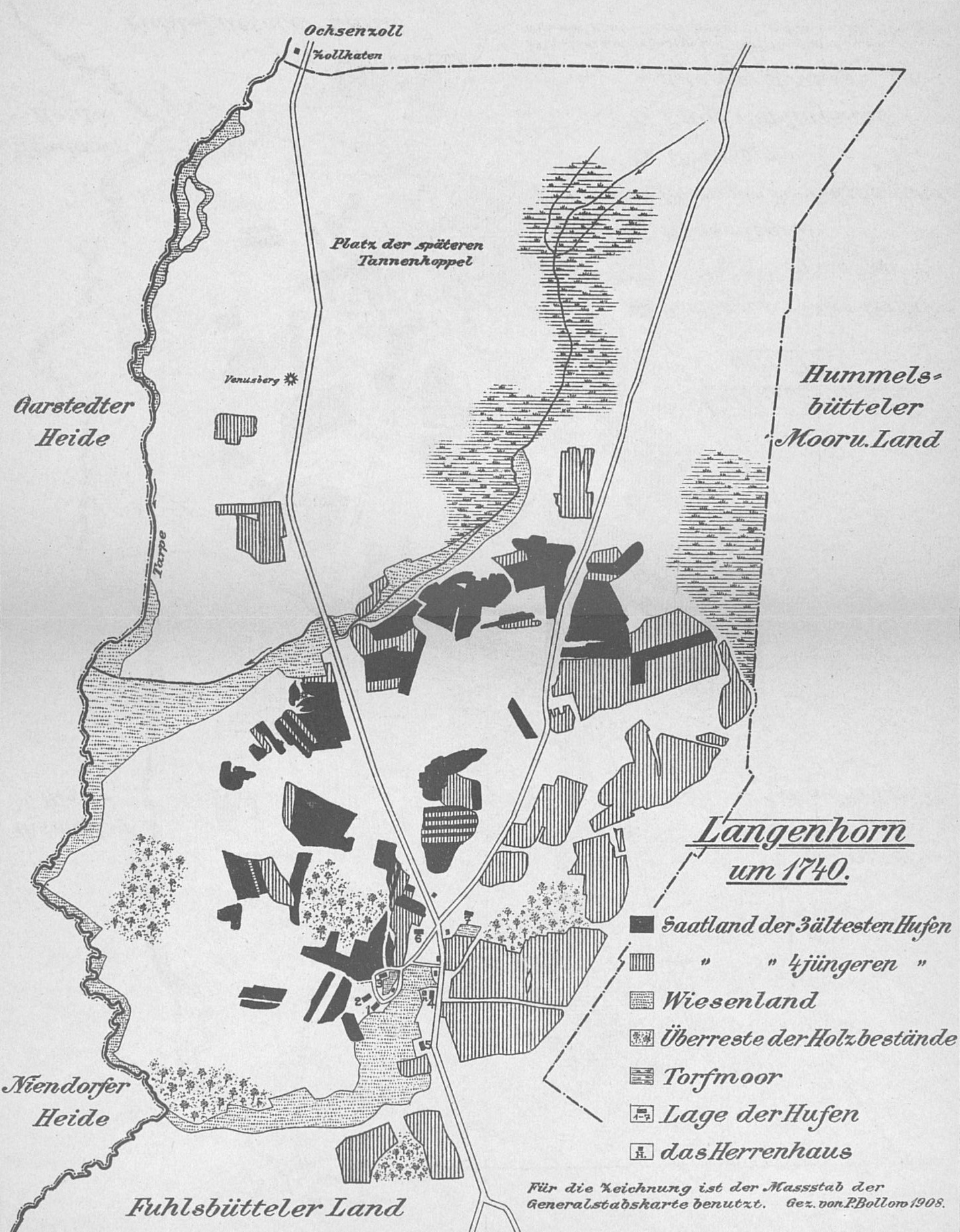 Karte Langenhorn um 1740, gezeichnet von P. Bollor? (Letzter Buchstabe auf der Karte unleserlich) 1908, aus dem Buch Geschichtliche Mitteilungen über die hamburgische Landgemeinde Langenhorn von Johann Friedrich Voigt (im deutschen Wikipedia: Friedrich Voigt), 1909. Fälschlicherweise wurde oben die nördliche, gerade Grenze von 1773 eingezeichnet